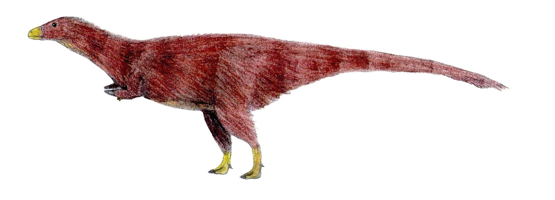 Restauración